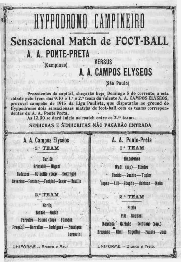 Convite do jogo entre Ponte x Campos Elyseos no ano de 1915.